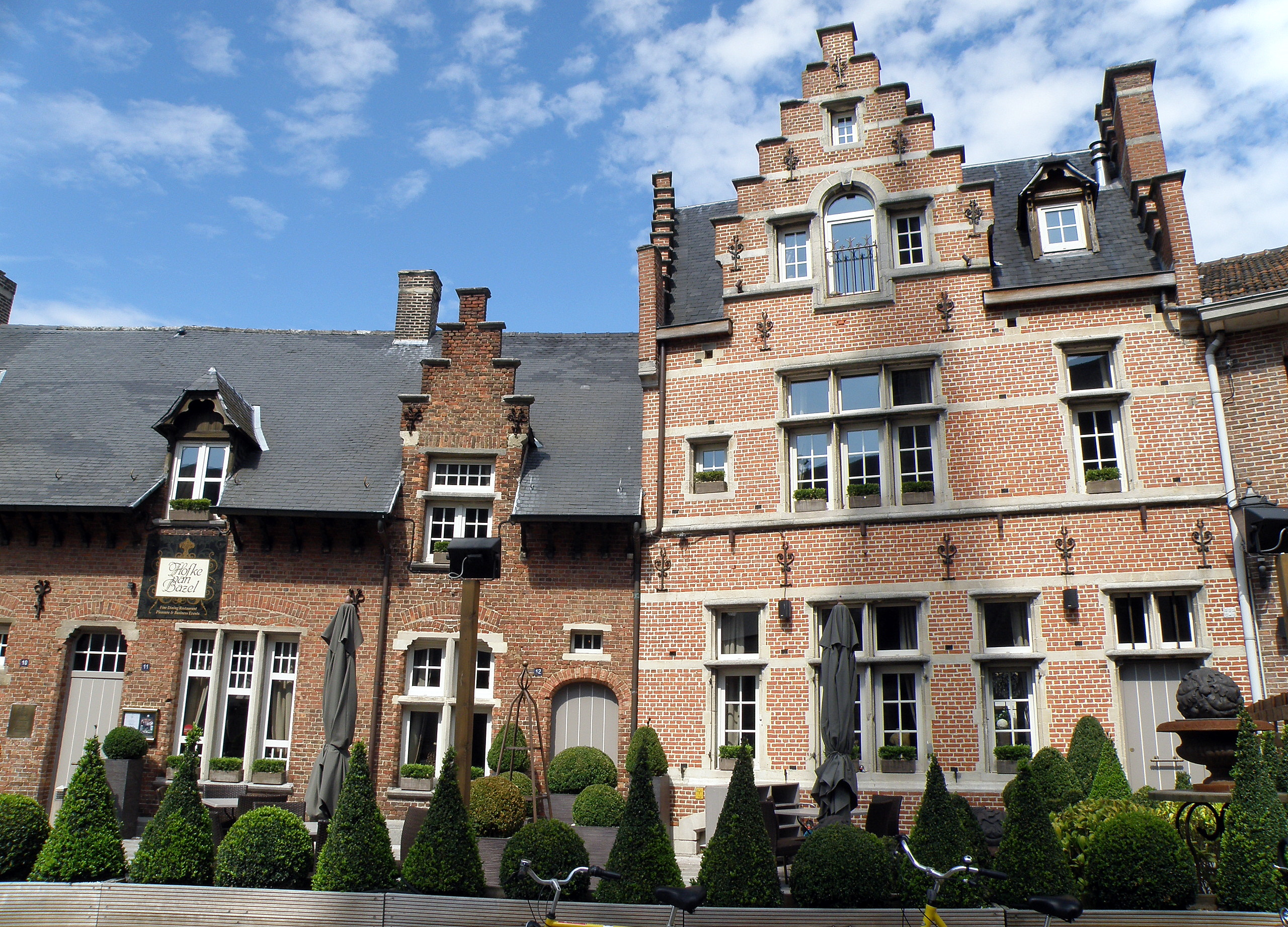 Bazel (gem. Kruibeke, prov. Oost-Vlaanderen, België). Huis gelegen Kon. Astridplein (zonder nummer, rechts in beeld, naast nr.12 links), neo-Vlaamse-renaissance uit 1914. Huis links ("Hofke van Bazel") uit 1905, neo-traditioneel.